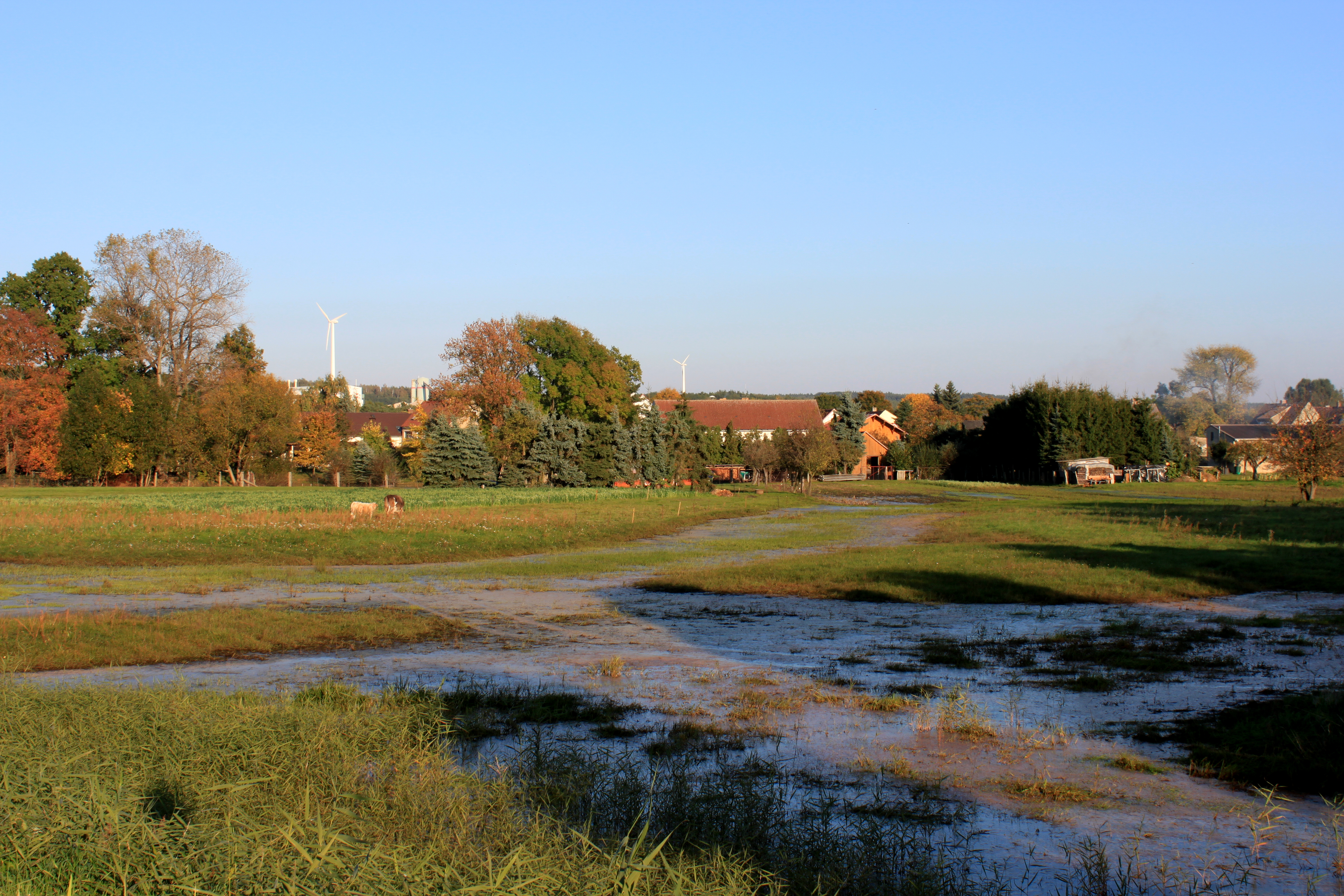 Haida